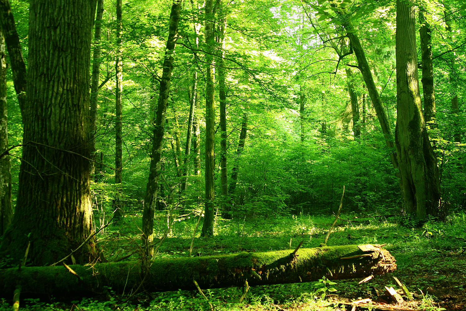 Specjalny obszar ochrony siedlisk Puszcza Białowieska. This is a photography of Natura 2000 protected area with ID PLC200004